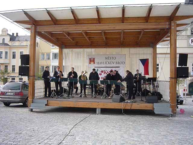 Autor fotografie Jiří Zelenka. První máj na počest zastřelených švadlen v USA. (Svátek práce - 1.máj.) Havlíčkův Brod. Kraj Vysočina. Czech Republik.